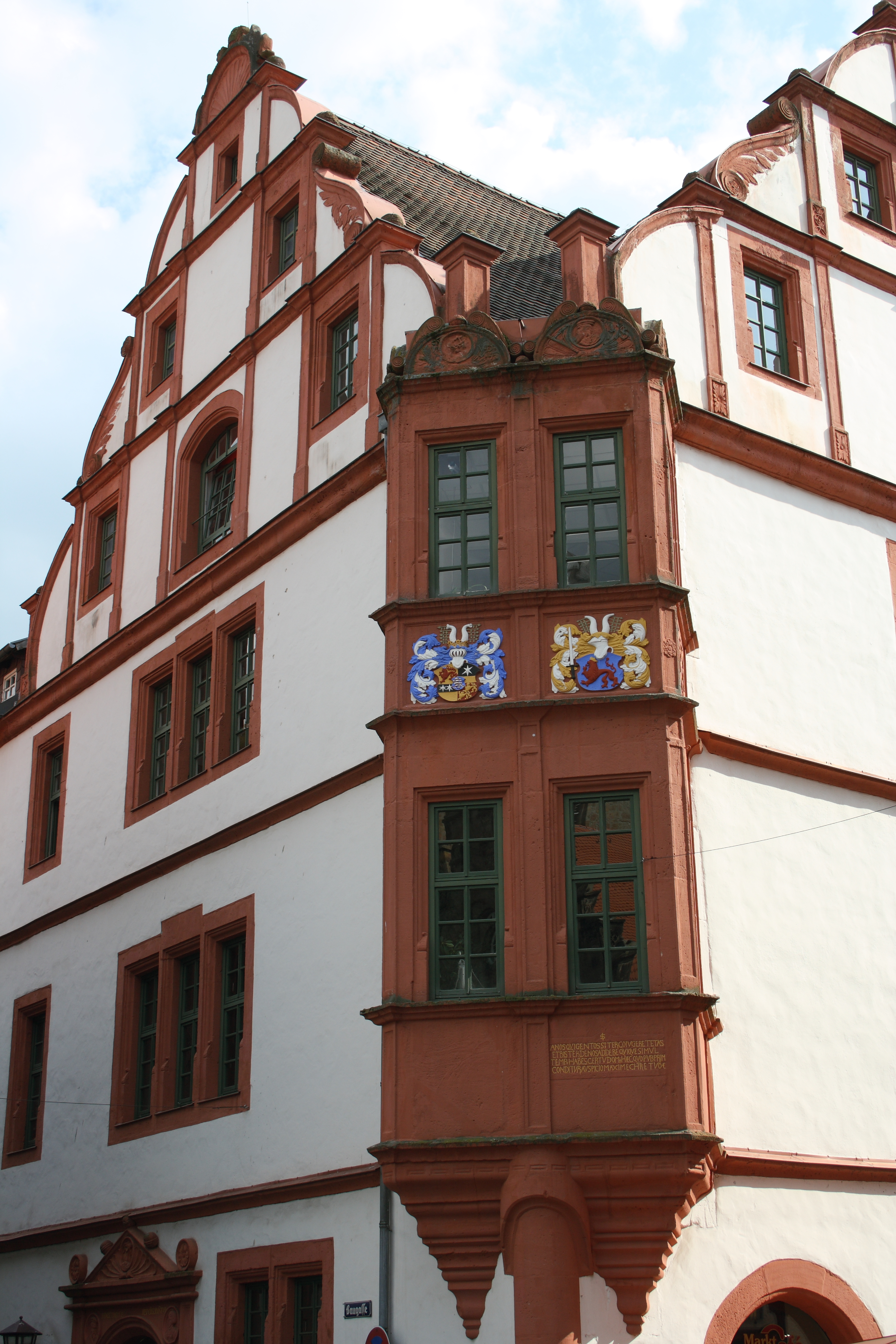 Hochzeitshaus in Alsfedl im Volgelsbergkreis (Hessen), Marktplatz 7